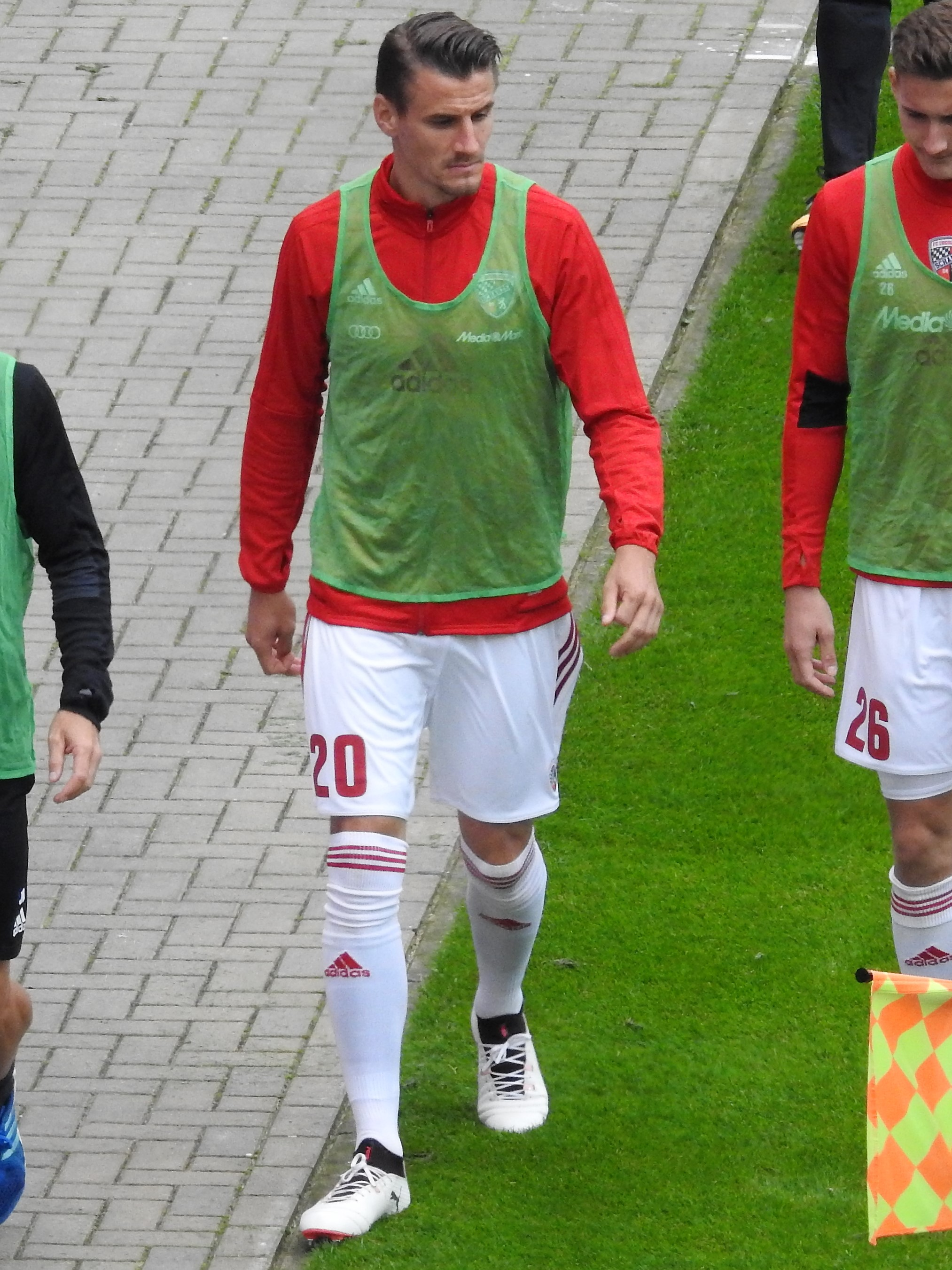 Kutschke, Stefan Ingolstadt 17-18